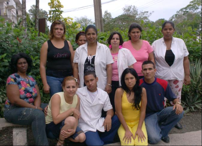 Colectivo de trabajo de la Farmacia 605 de Vado del Yeso, Río Cauto Granma Cuba